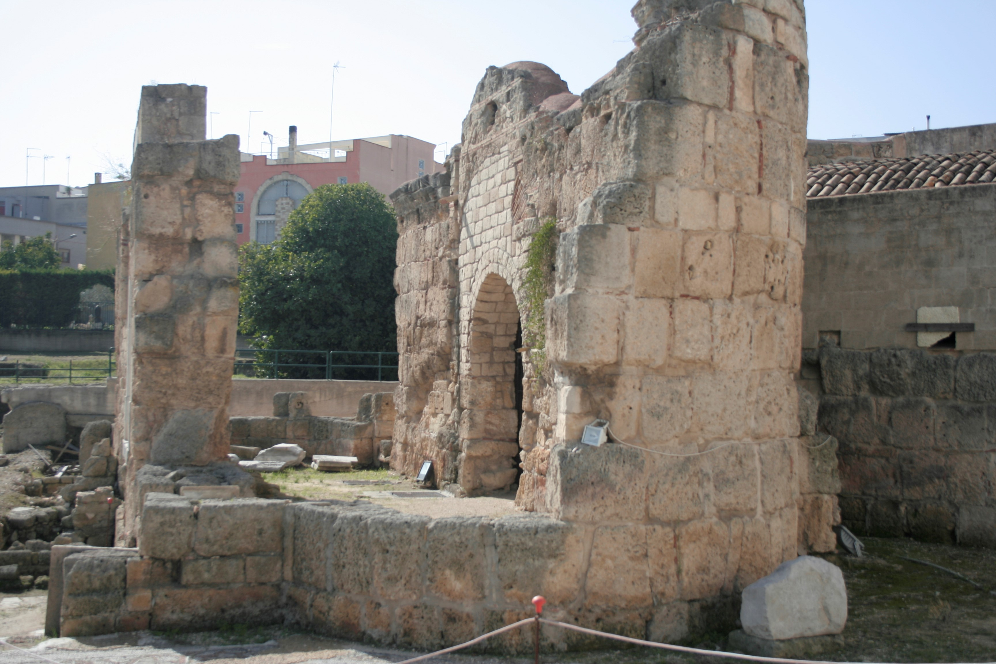 Saint John Baptistery in Canosa di Puglia